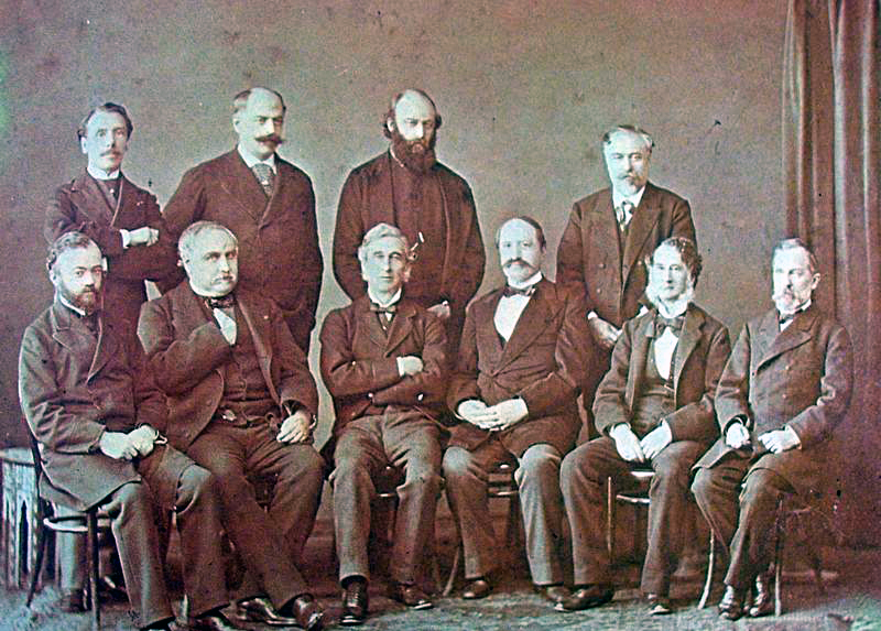 Участници в Цариградската конференция. В средата сър Хенри Елиът и граф Николай Игнатиев.